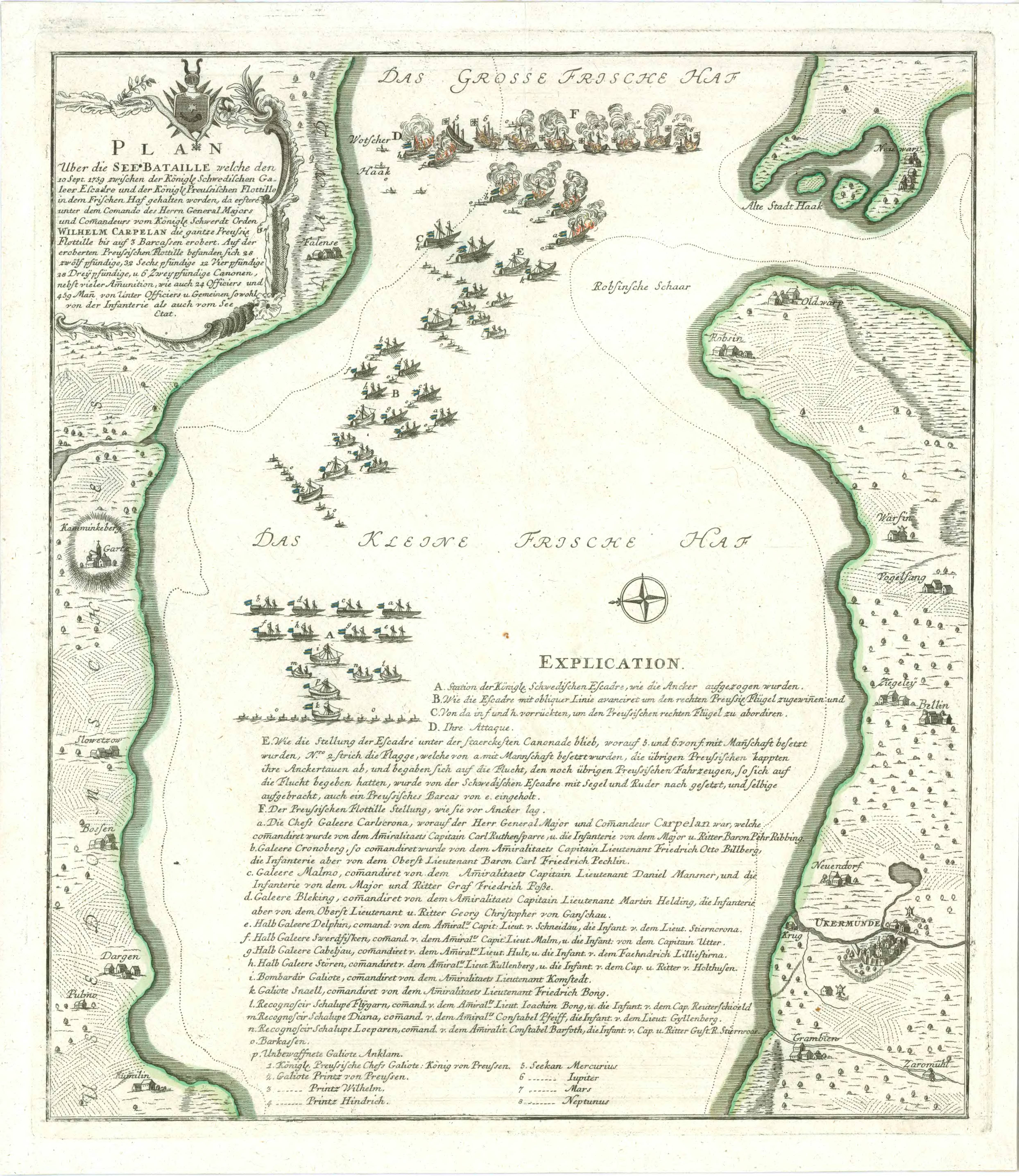 Seeschlacht im Stettiner Haff 1759 / Sea Battle in the Stettiner Haff 1759